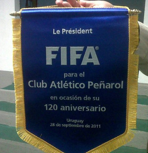 Gift given to CA Peñarol from FIFA in order to congratulate the first for its 120th anniversary...